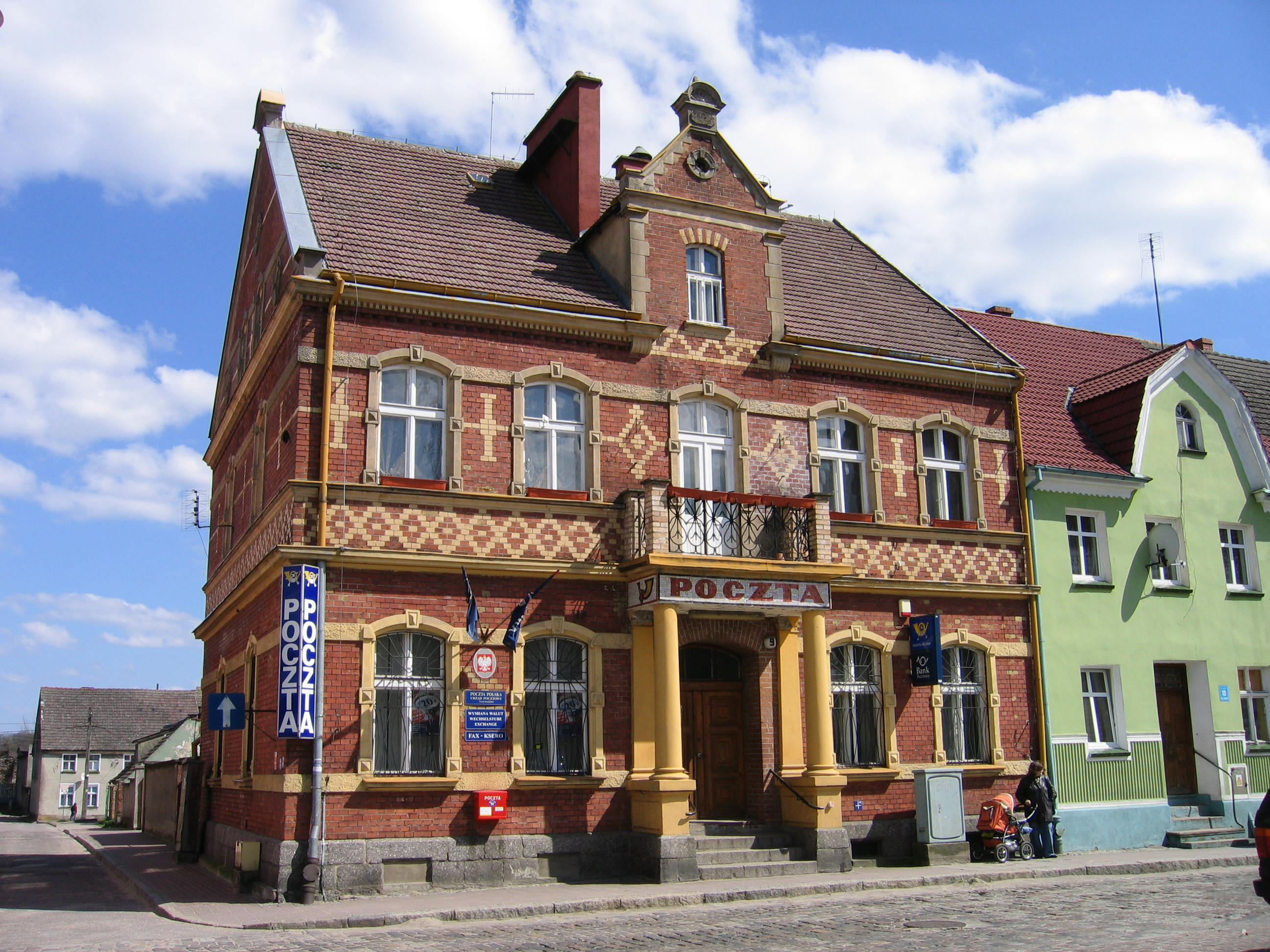 Maszewo, ul.Wojska Polskiego 9 - poczta